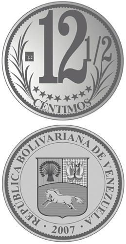 Bolivar Fuerte